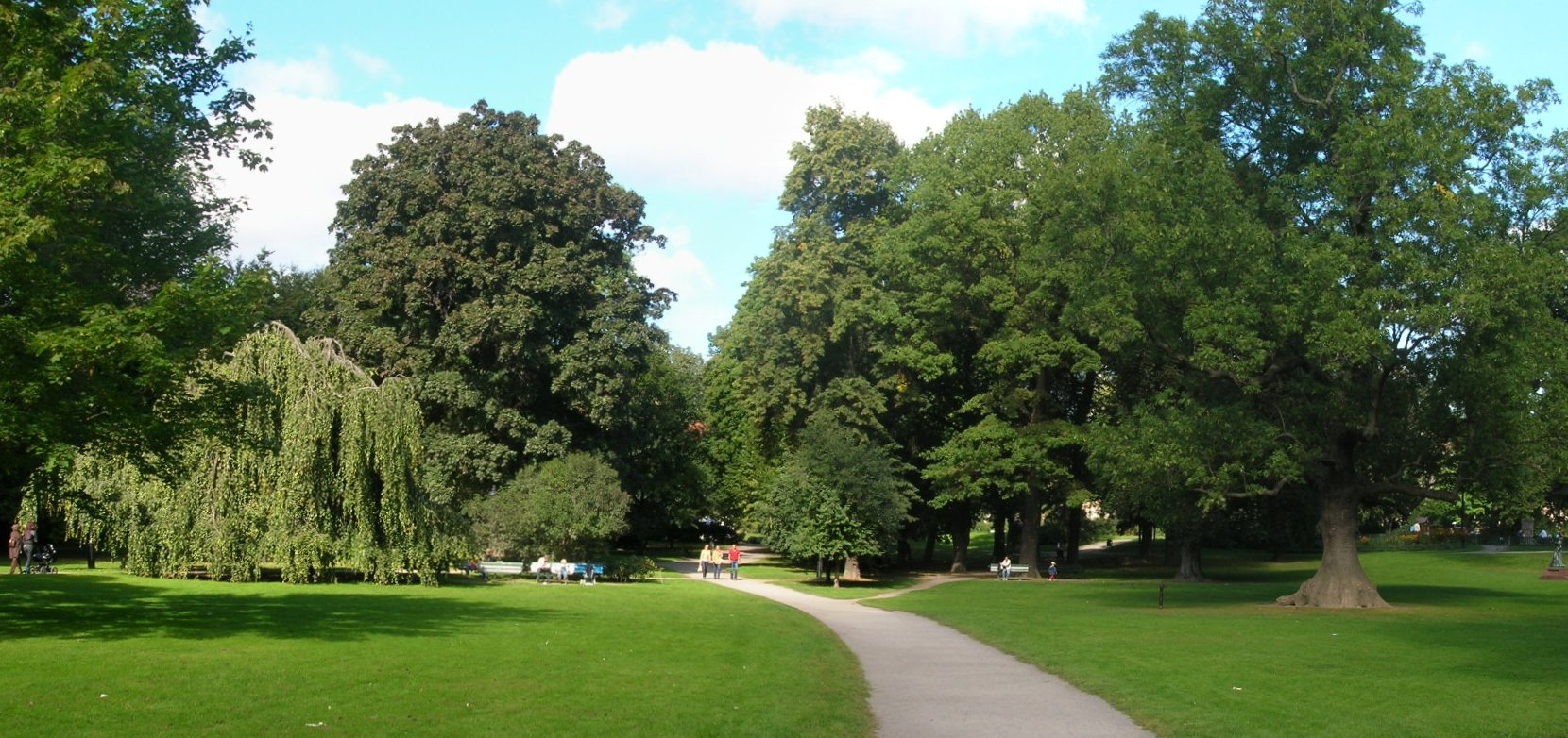 Humlegården, a park in central Stockholm, Sweden